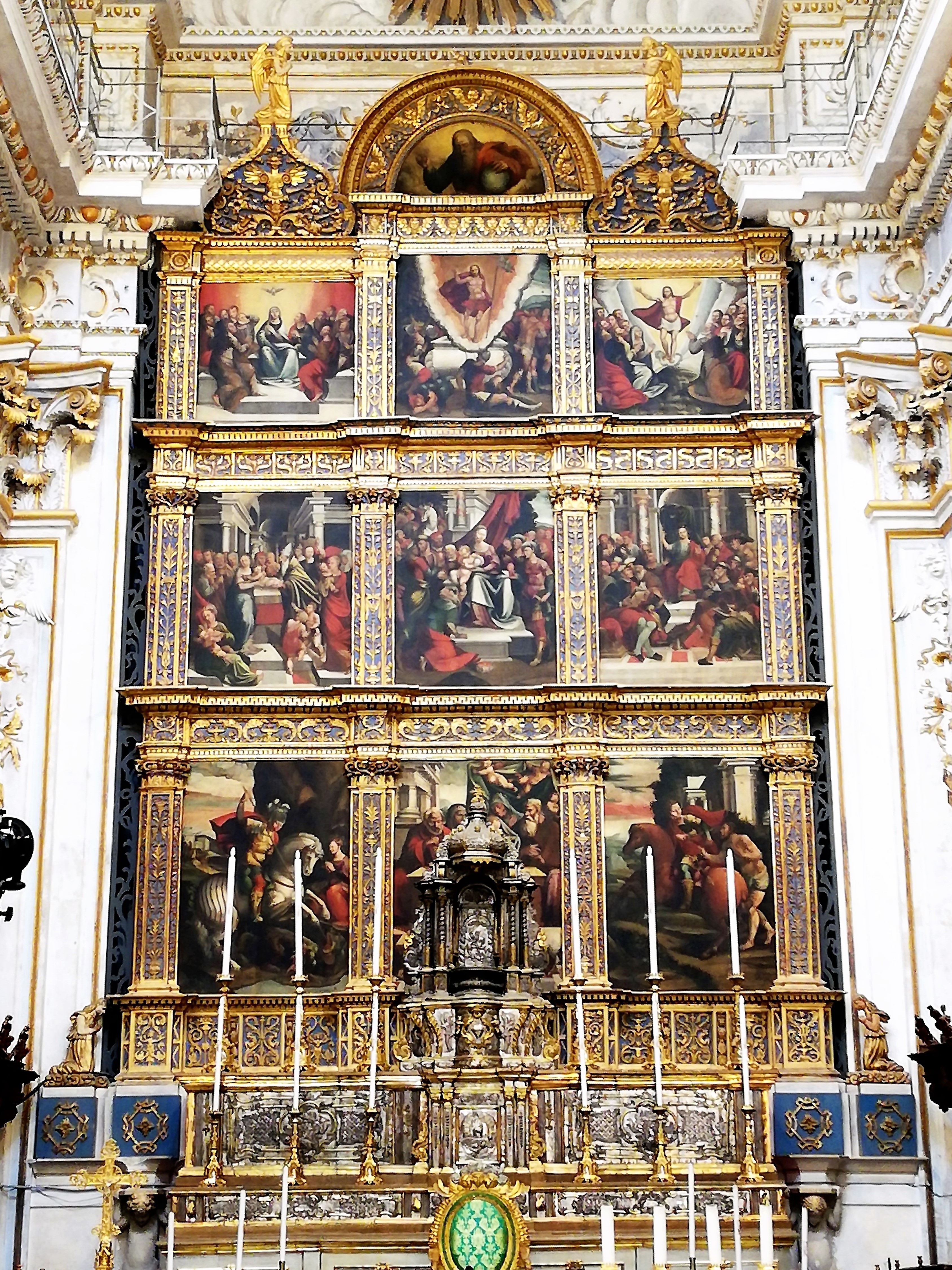 Polittico di Bernardino Nigro, altare maggiore del duomo di San Giorgio, Modica.